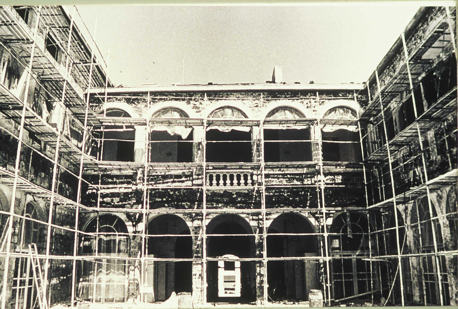 Yerushalmi Building 1989